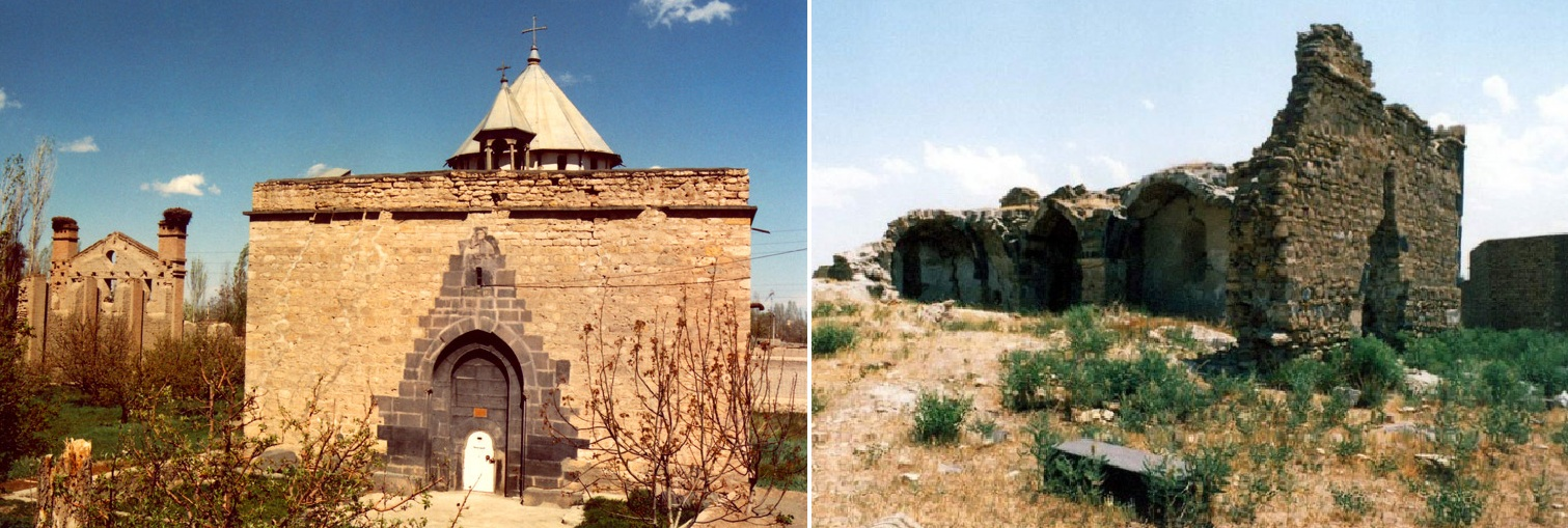 Kilse salmas